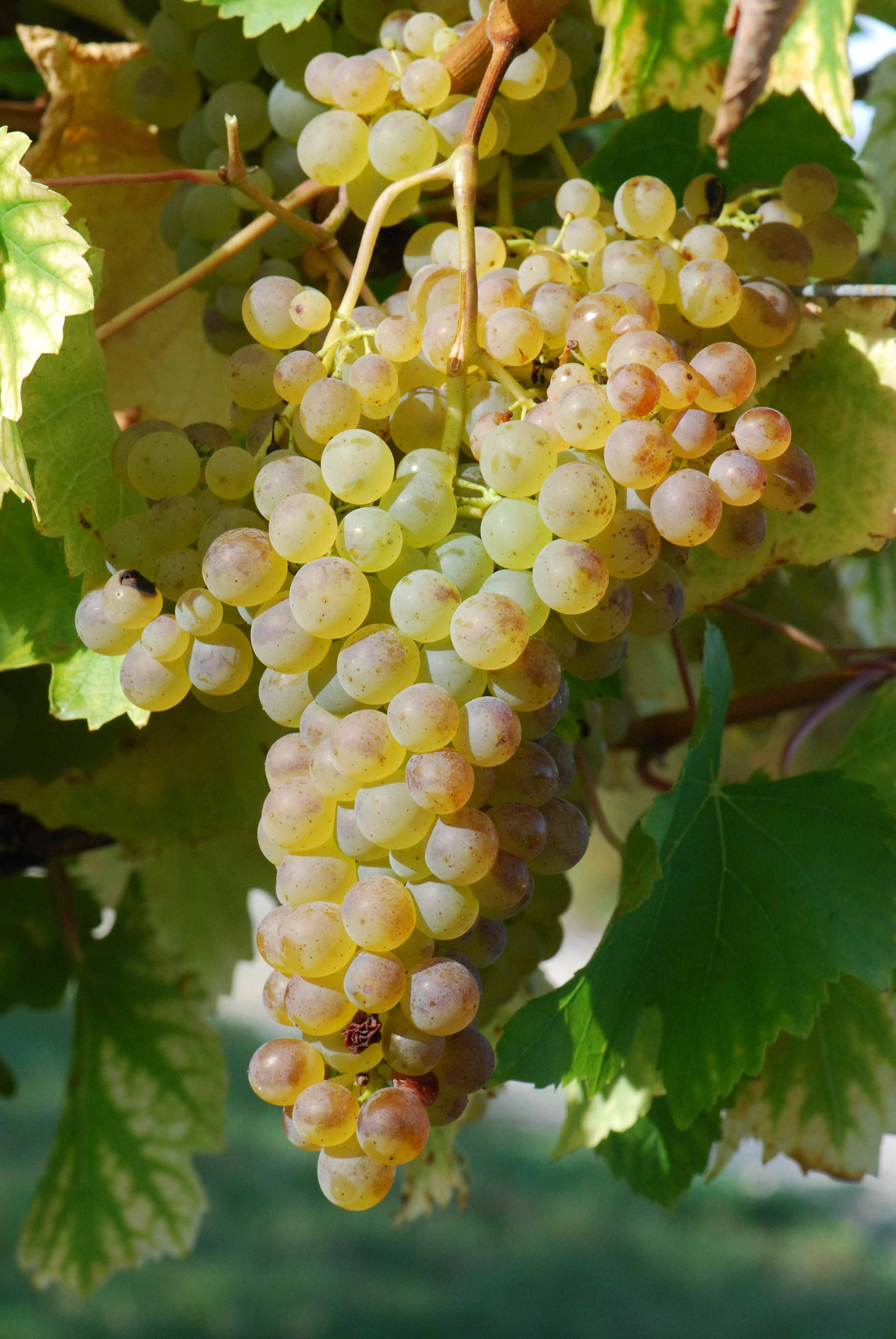 Colombard, conservatoire du vignoble charentais, Cherves 17